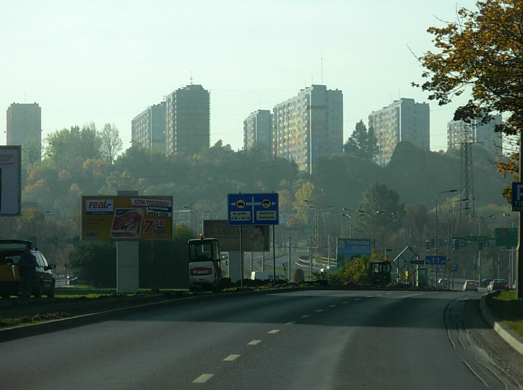 Aleja Stefana Wyszyńskiego w Bydgoszczy, w tle Zbocze Bydgoskie na osiedlu Wyżyny